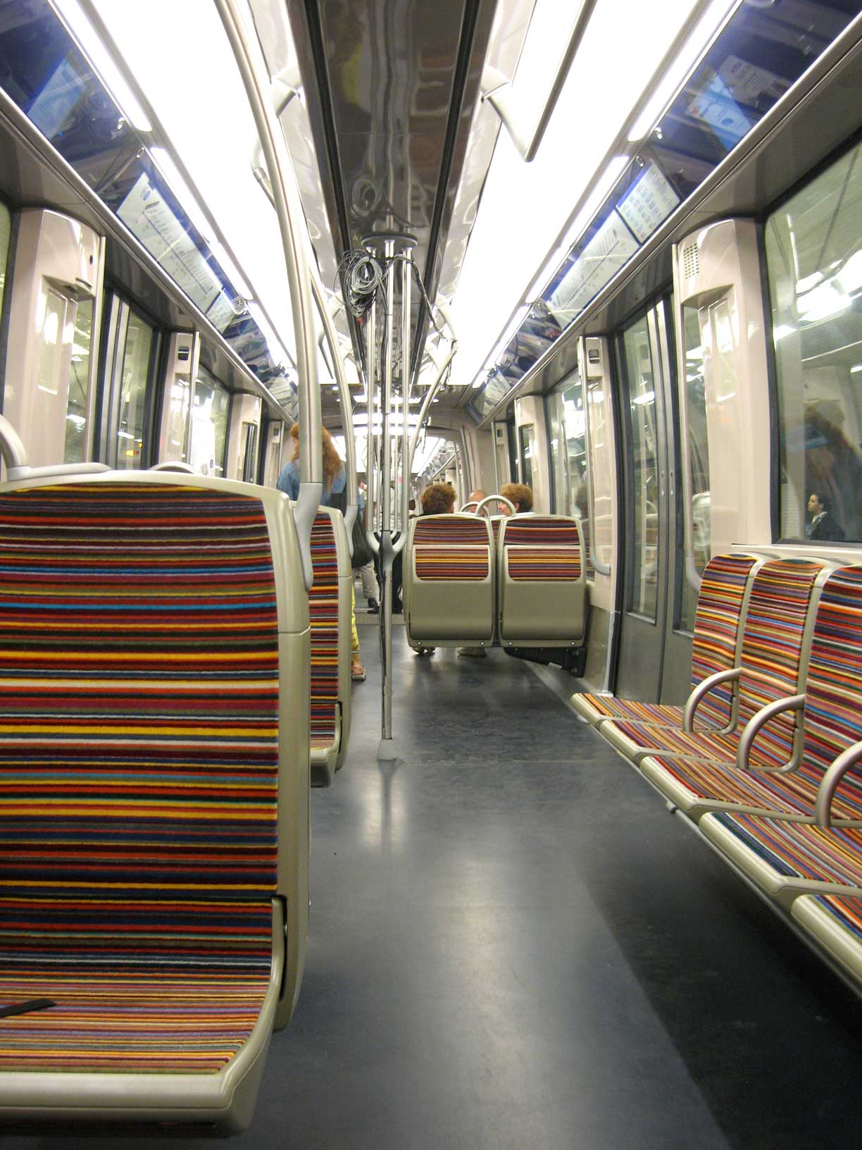 Description : Metro de Paris Rame de la serie MF2000 (prototype, quelques cables trainent) Intérieur de la rame Station Porte d'Ivry, Journées du Patrimoine Lieu : Paris, France Date : Septembre 2006 Auteur : Pline photo personnelle